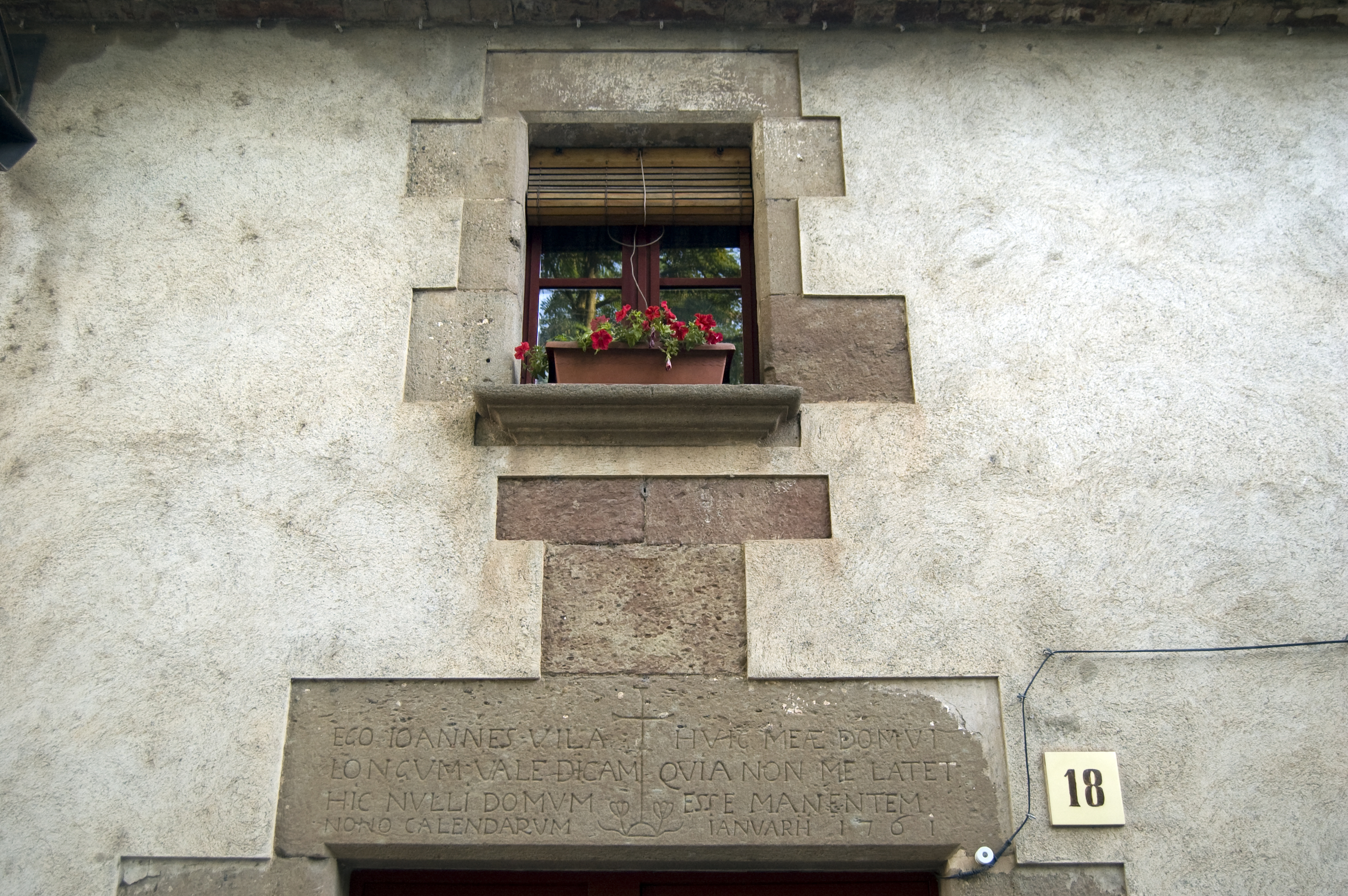 dinteles de santa Pau: Cal Sintet (2)